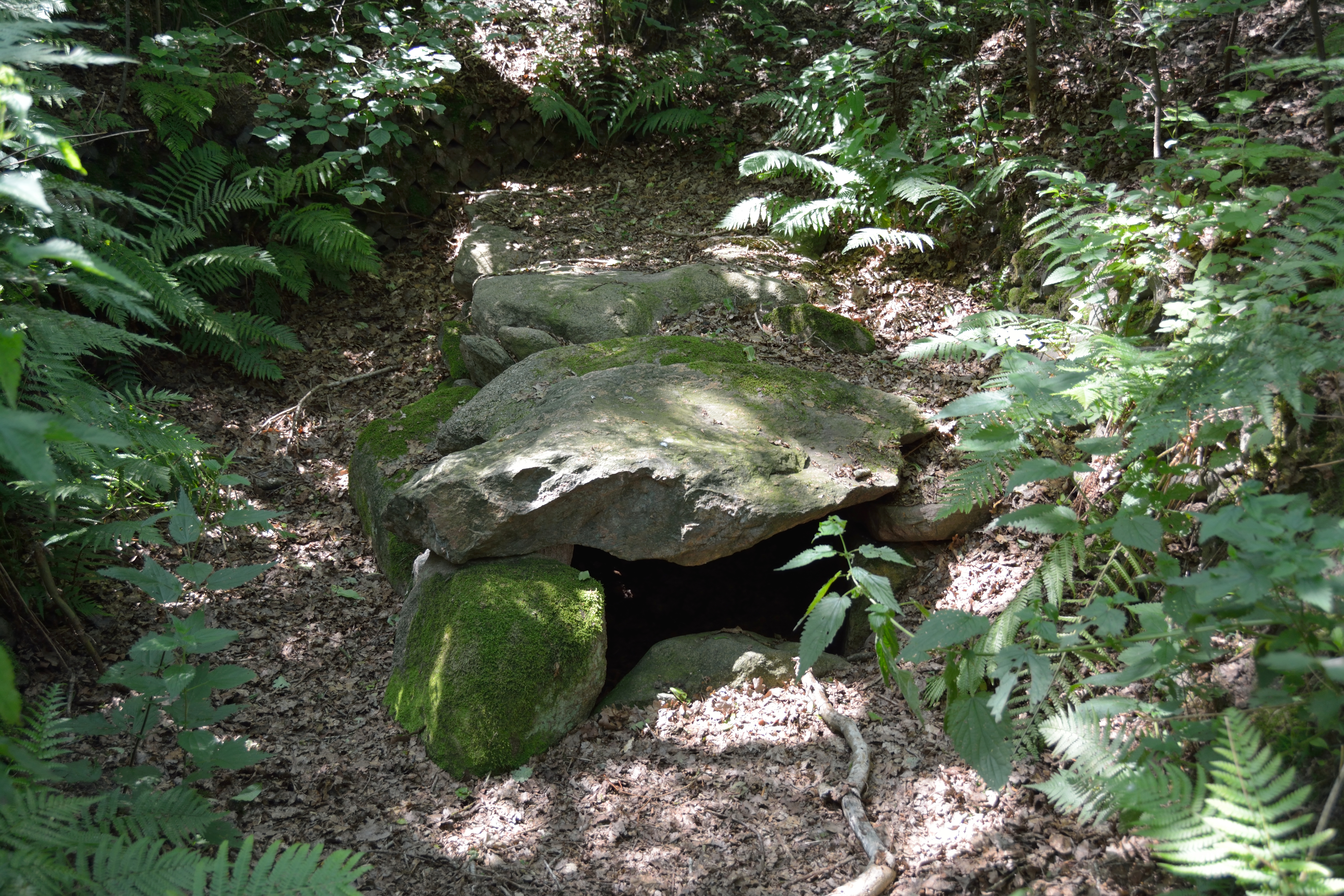 Vaale, der Rugenbarg ist ein Großsteingrab